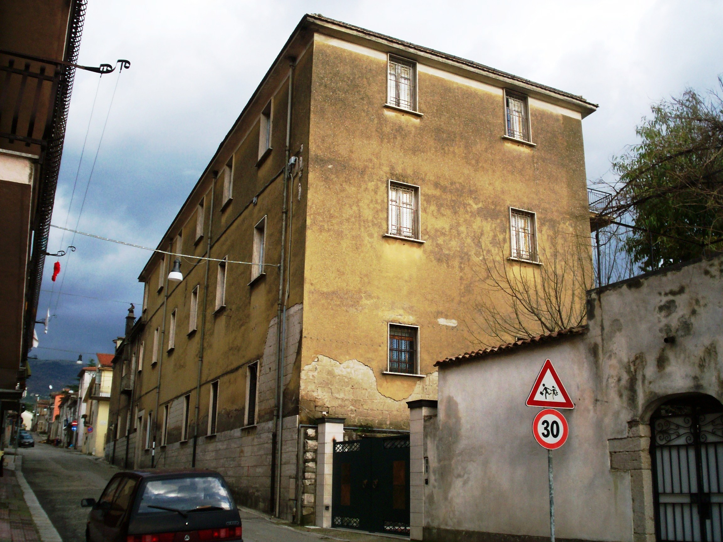 La facciata dell'ala moderna del Palazzo Ciaburro su via Massarelli in Cerreto Sannita (Bn).